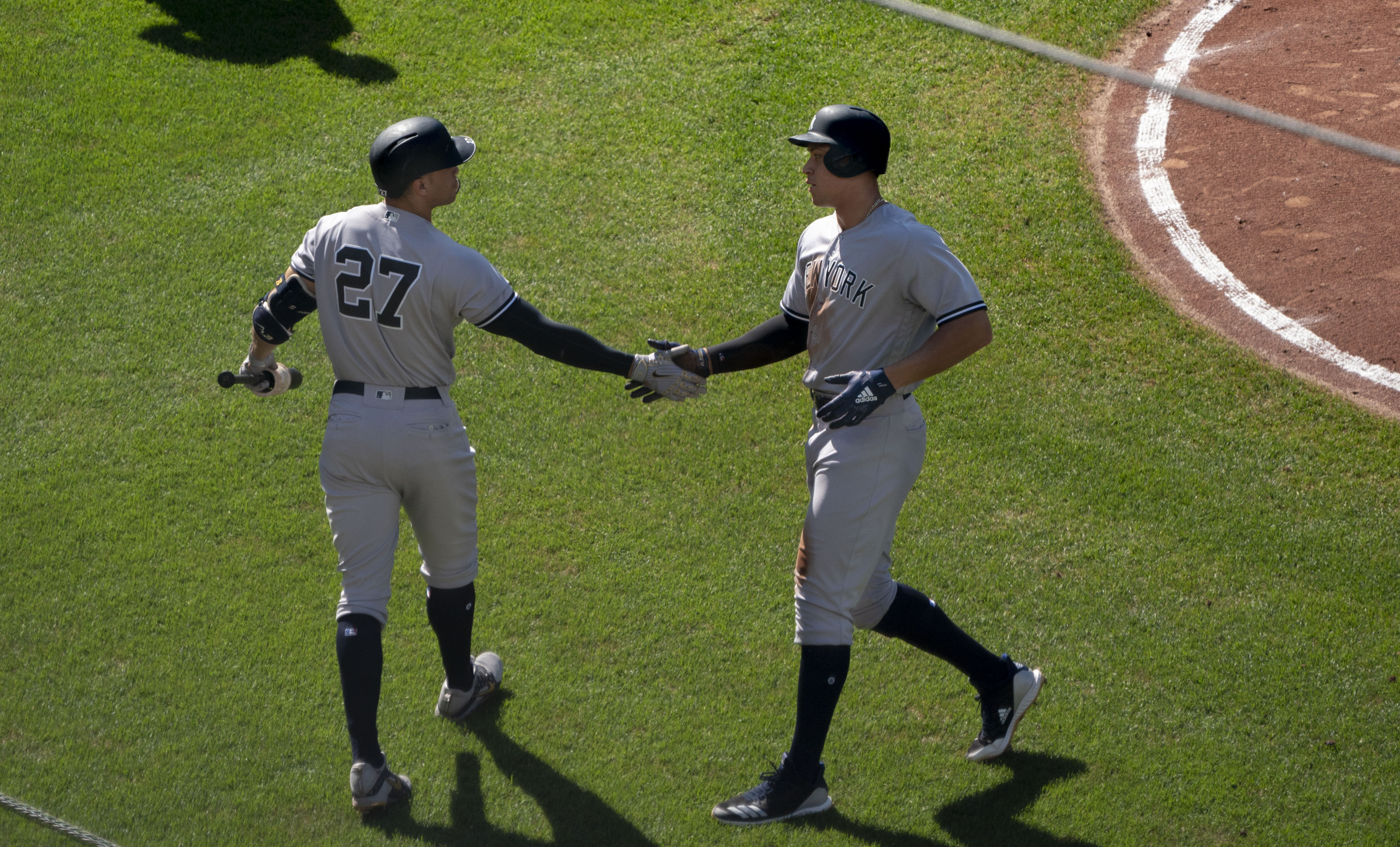 Yankees at Orioles 7/9/18